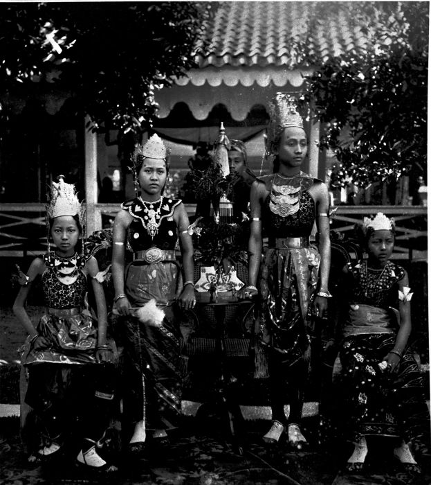 Foto. Bruidspaar uit Bantam, West-Java, ze zijn verkleed als Hinduvorsten en worden beschouwd als 'vorsten voor één dag'.